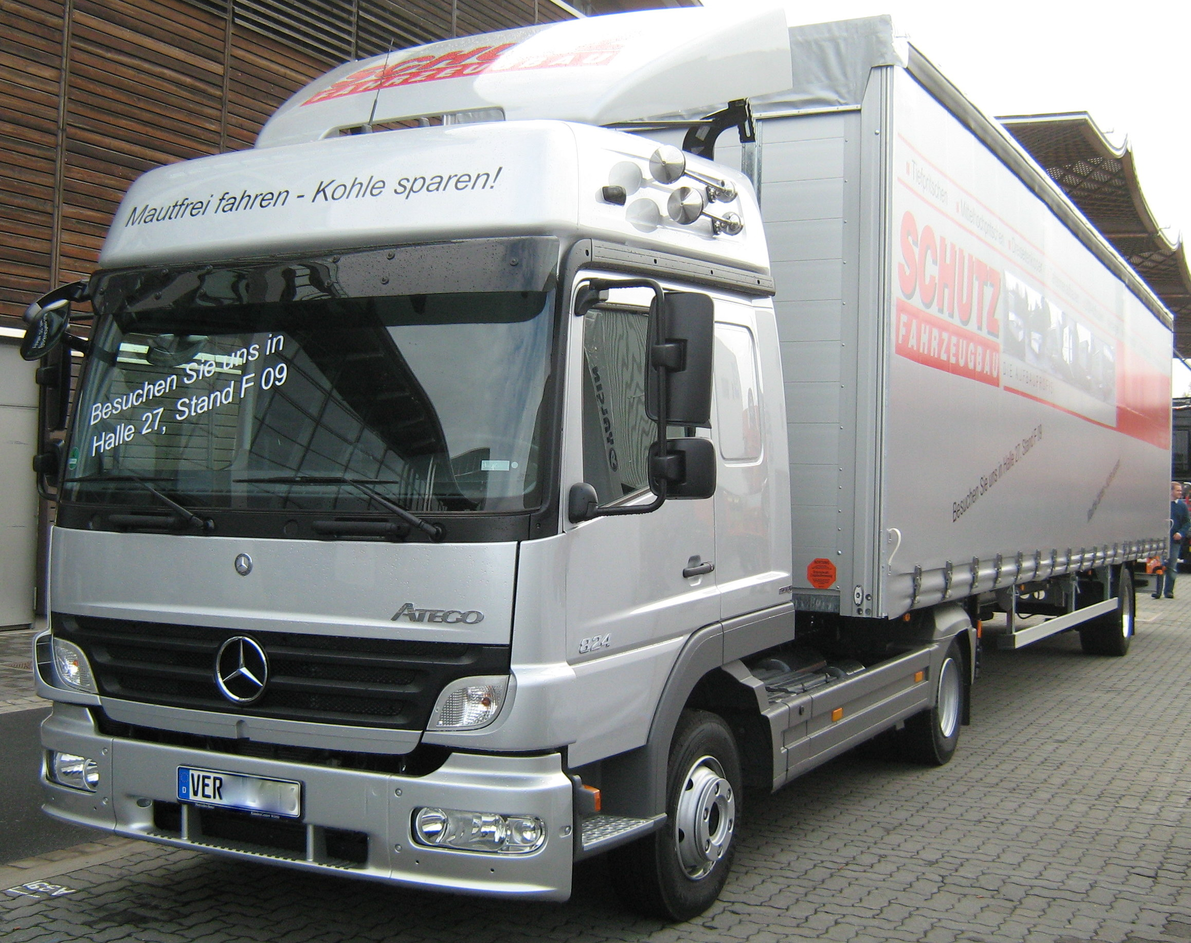 LKW für 12 t zGG (Mautfrei) auf der IAA 2010